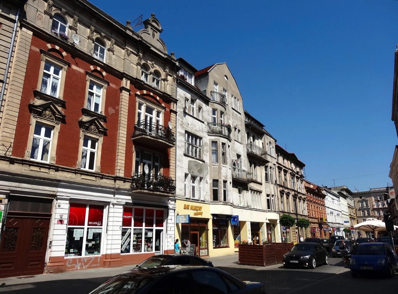 Ulica Dworcowa w Bydgoszczy na odcinku od ul. Gdańskiej do ul. Warmińskiego